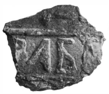 Абломак звана. Ніжняя царква ў Гродне